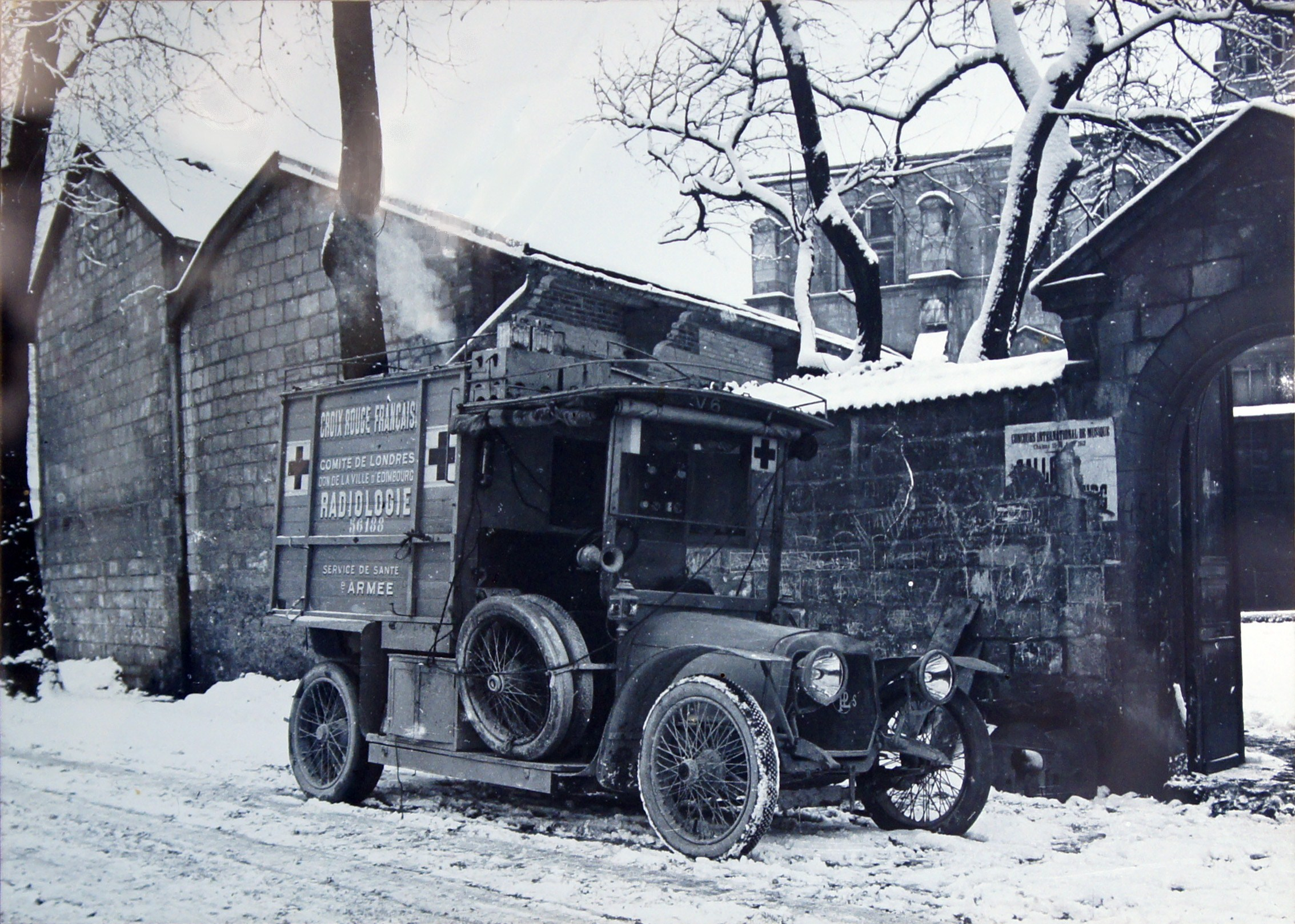 Ambulance de radiologie Panhard Levassor appartenant à la Croix Rouge, don de la ville d'Edimbourg, collection du fort de la Pompelle.